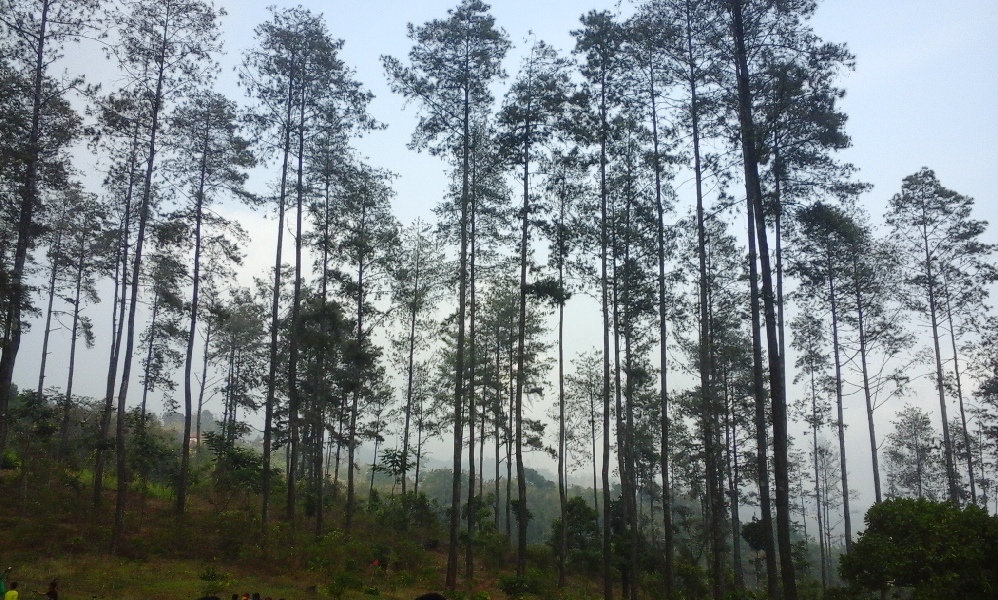 hutan pinus yang masih asri berlokasi disekitar air terjun pacet, mojokerto.